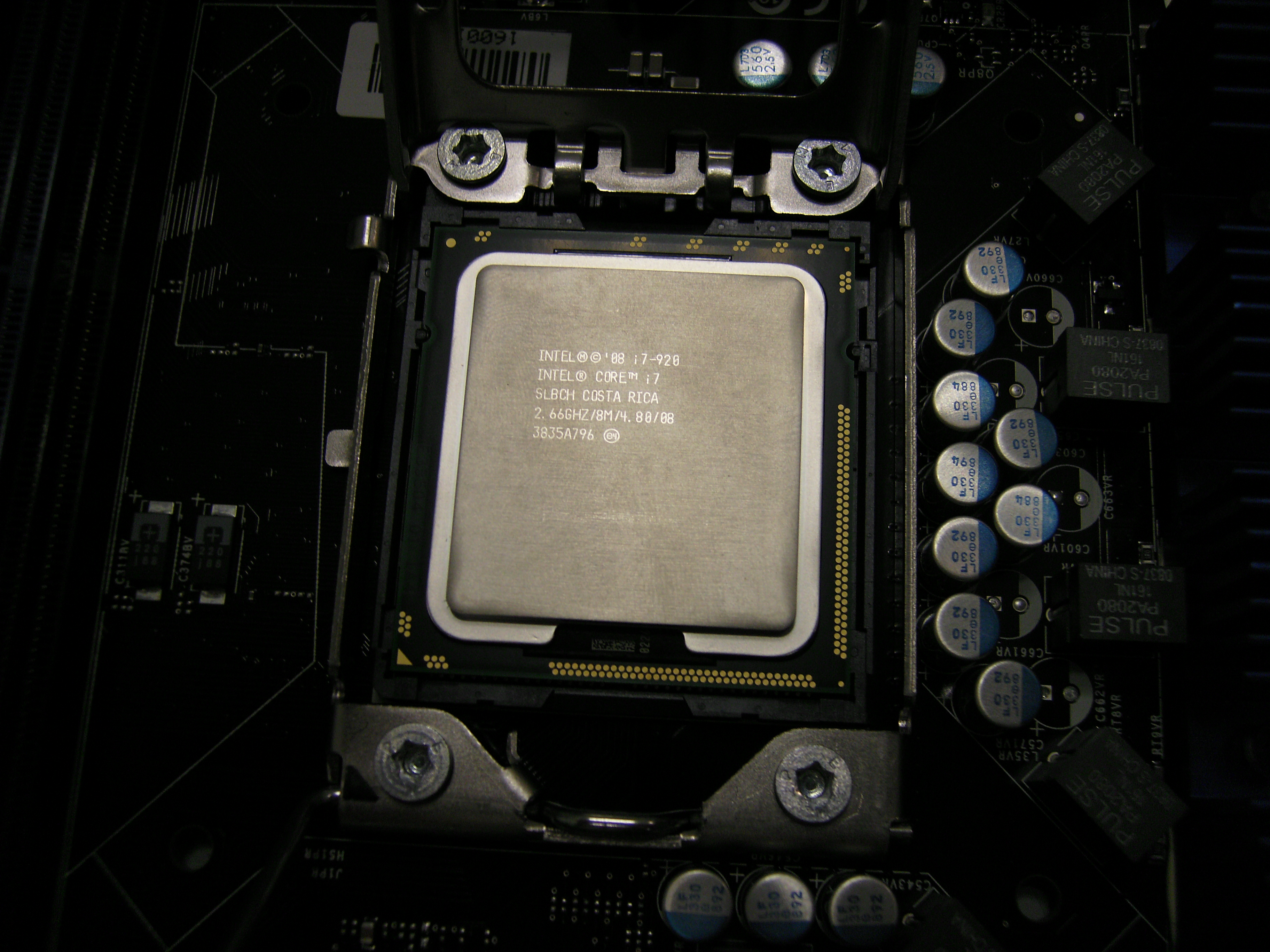 Microprocesador Intel Core i7-920